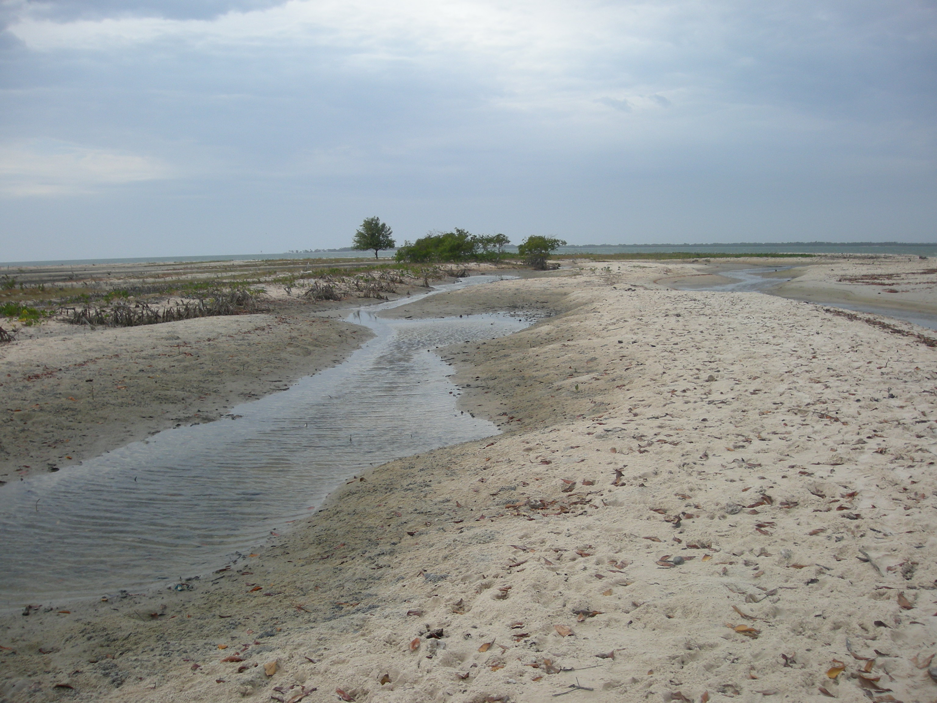 Bancs de sable et bolongs sur l'île de Carabane (Casamance, Sénégal)